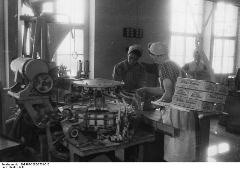 Erfurt, Nährmittelwerk, Verpackung Größter Nährmittelbetrieb der Ostzone Lorenz Döhler - Erfurt. Den größten Anteil an der Produktion hat die Herstellung von Kindernährmitteln und Puddingpulvern. In einem Arbeitsgang von 8 Stunden schafft die Maschine allein 20-22 000 Beutel zu je 50 Gramm Puddingpulver. U.B.z.: Abtransport von der Maschine zum Förderband. Aufn.: Illus/Thürk 1477-48